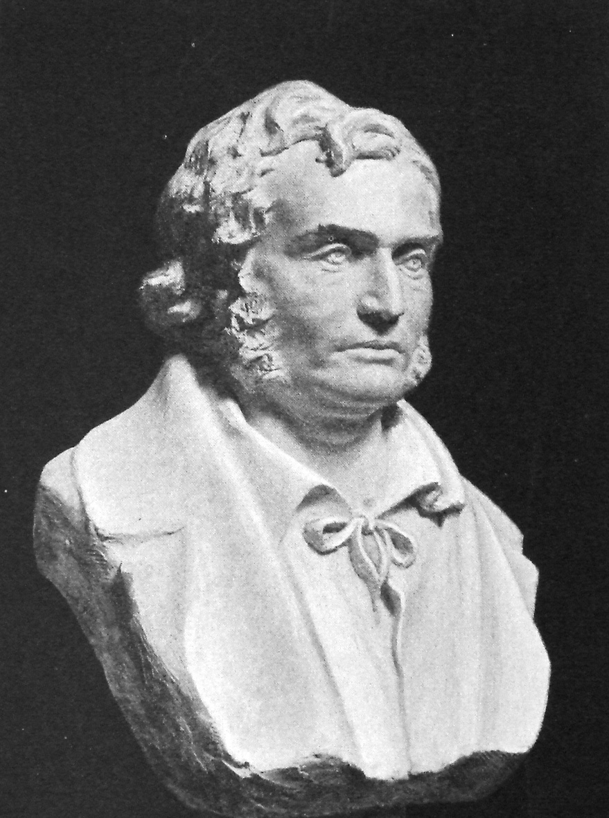 Poul Martin Møller (Født 21. marts 1794 i Uldum ved Vejle – død 12. marts 1838 i København) var en dansk forfatter og filosof. Virkede i en årrække (1854-80) som præst i Silkeborg og Hillerød.